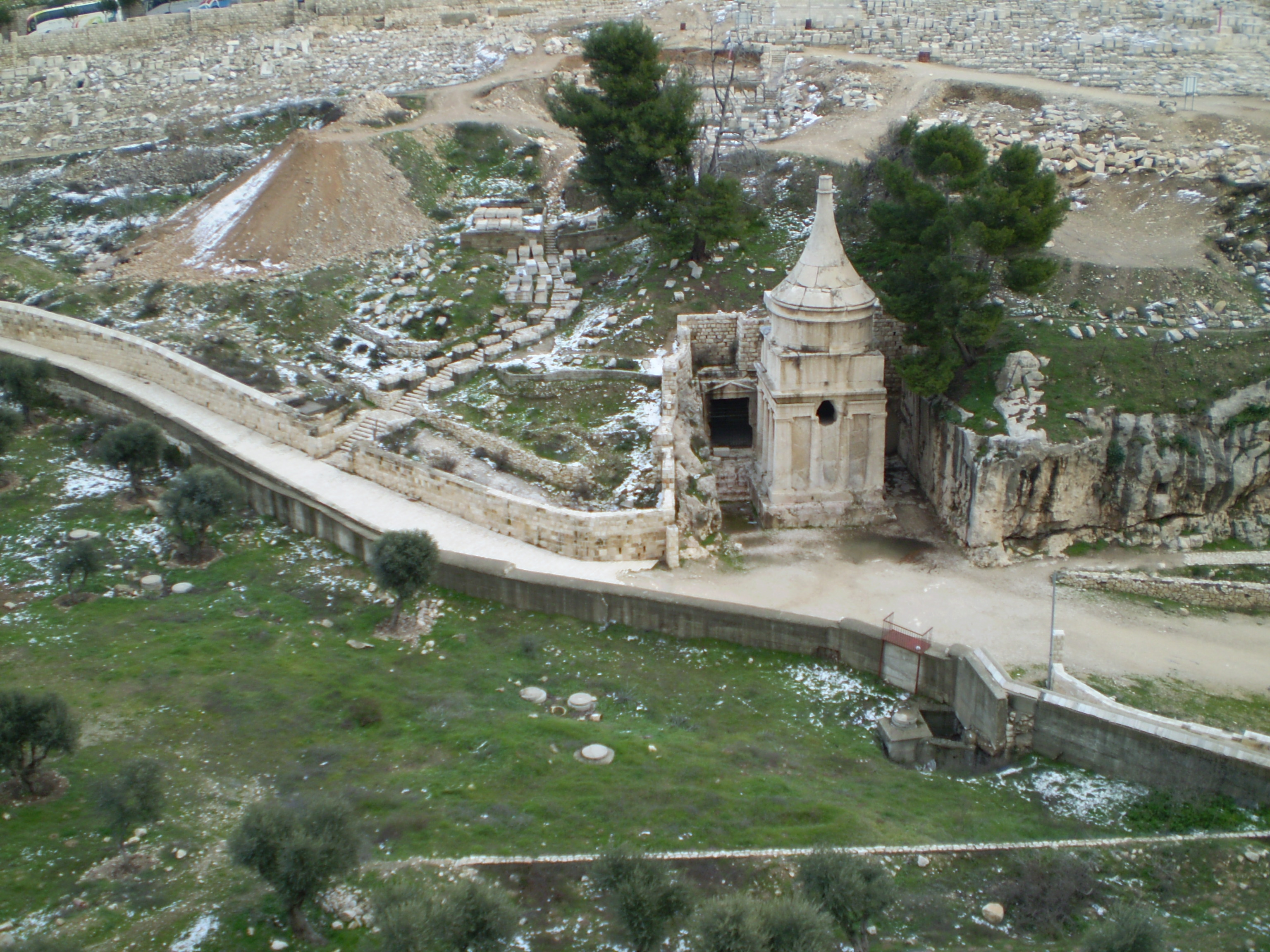 יד אבשלום ומערת יהושפט מאחוריו